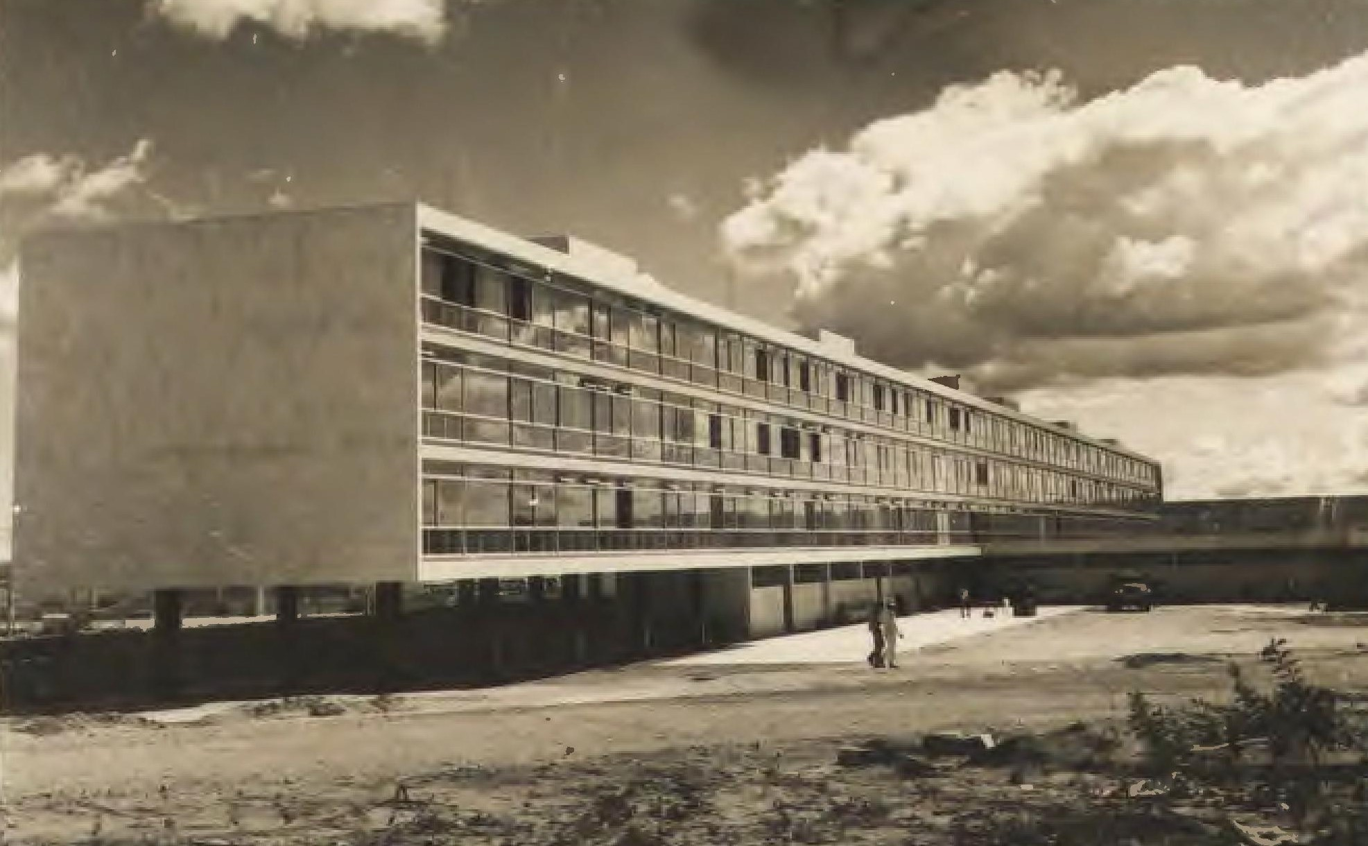 Fotografia do Fundo Correio da Manhã, sob a guarda do Arquivo Nacional.